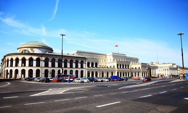 Warszawa (Polska)